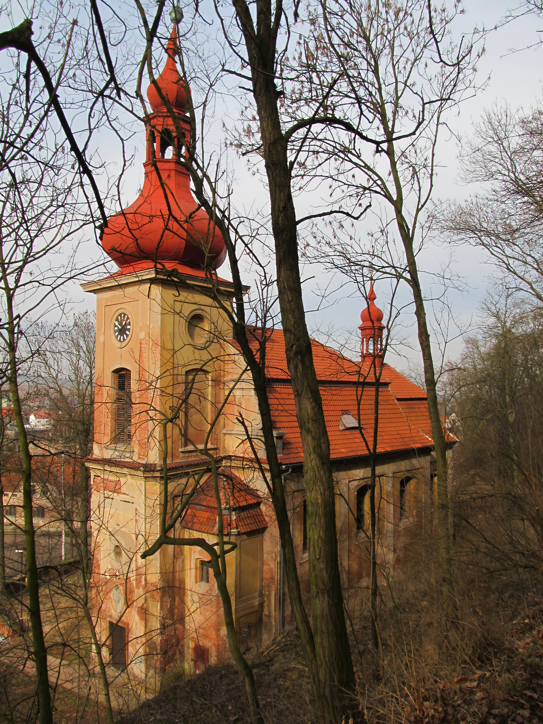 Kryry - kostel Narození Panny Marie z cesty k rozhledně